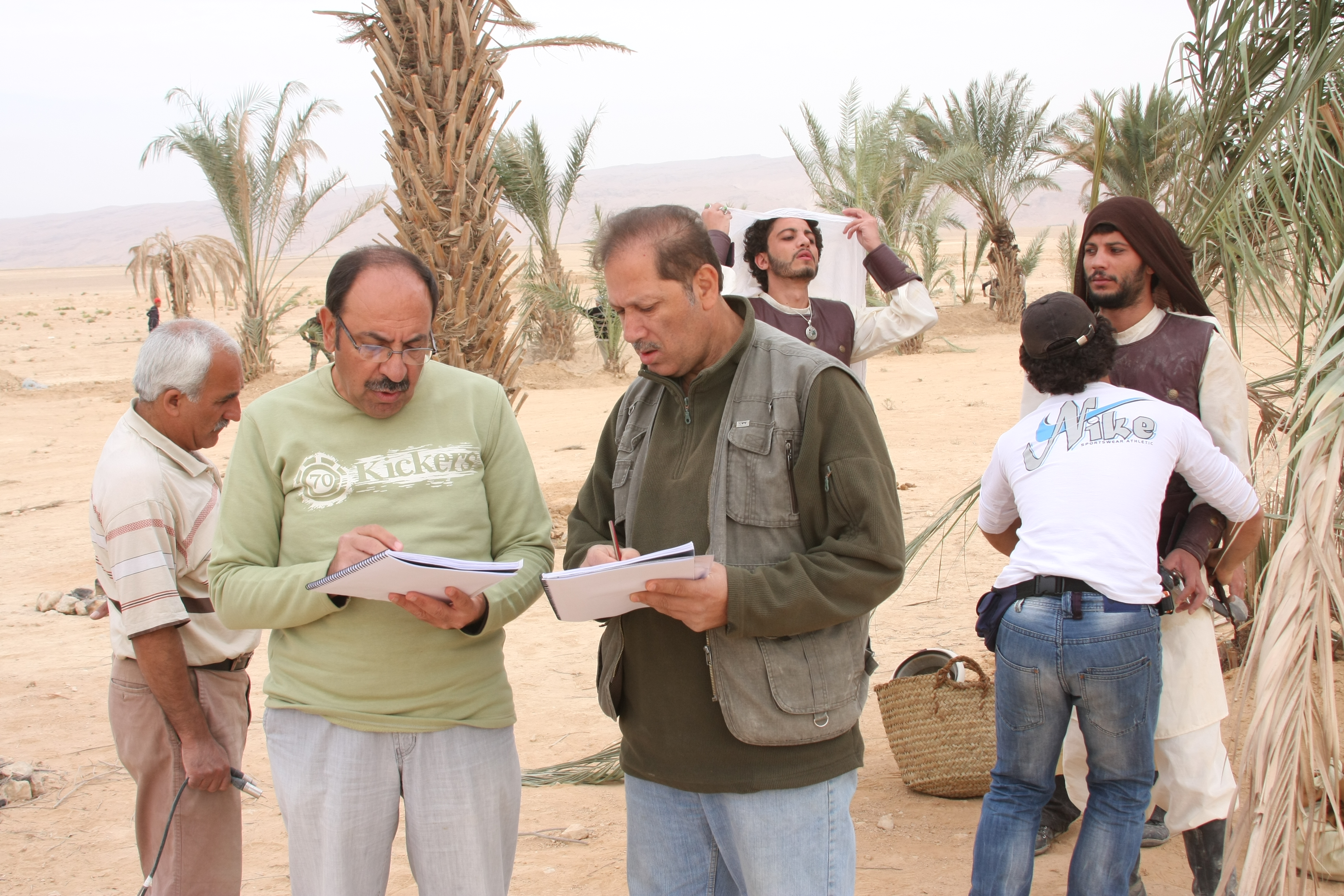 اخراج تلفزيوني